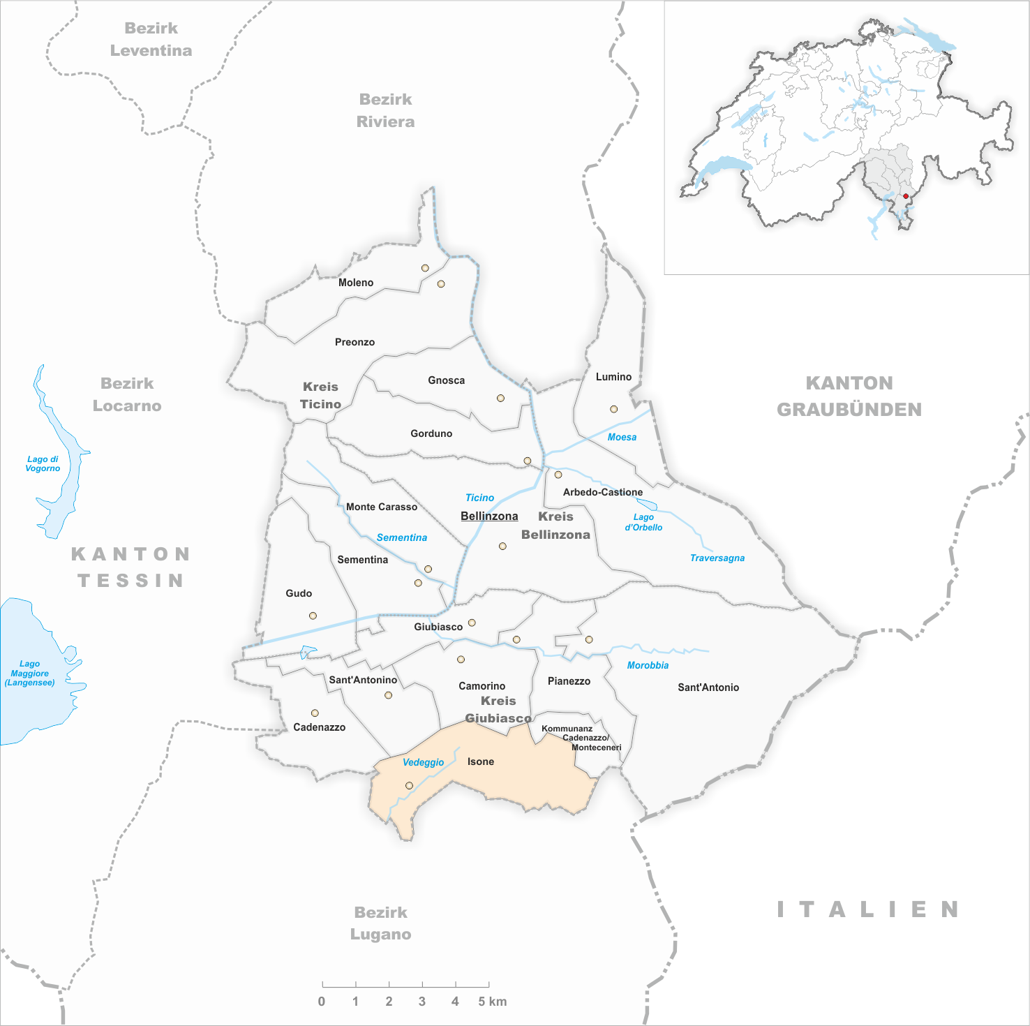 Municipality Isone